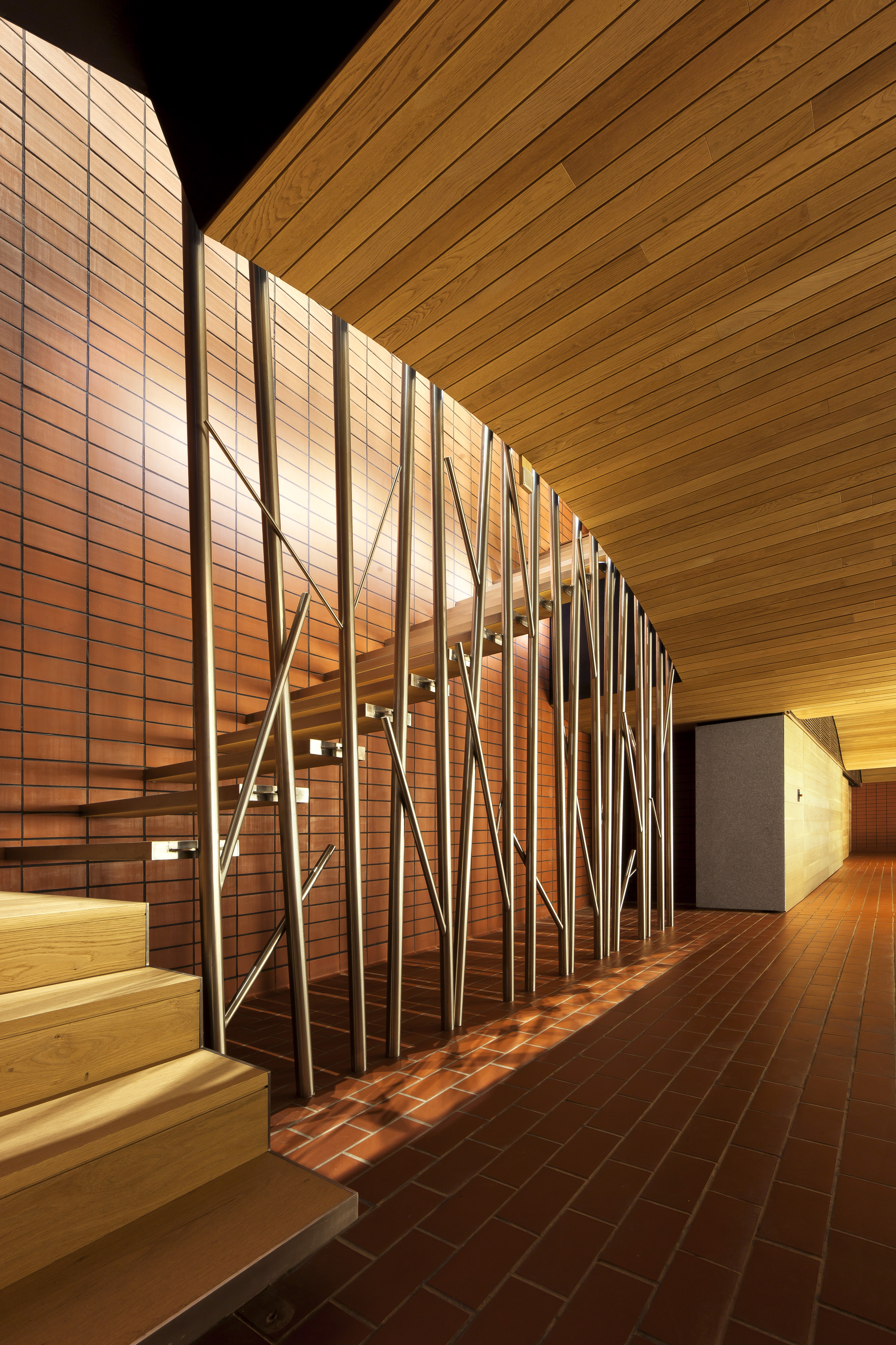 Harfentreppe, Sala de Barricas Vega, Sicile, 20011